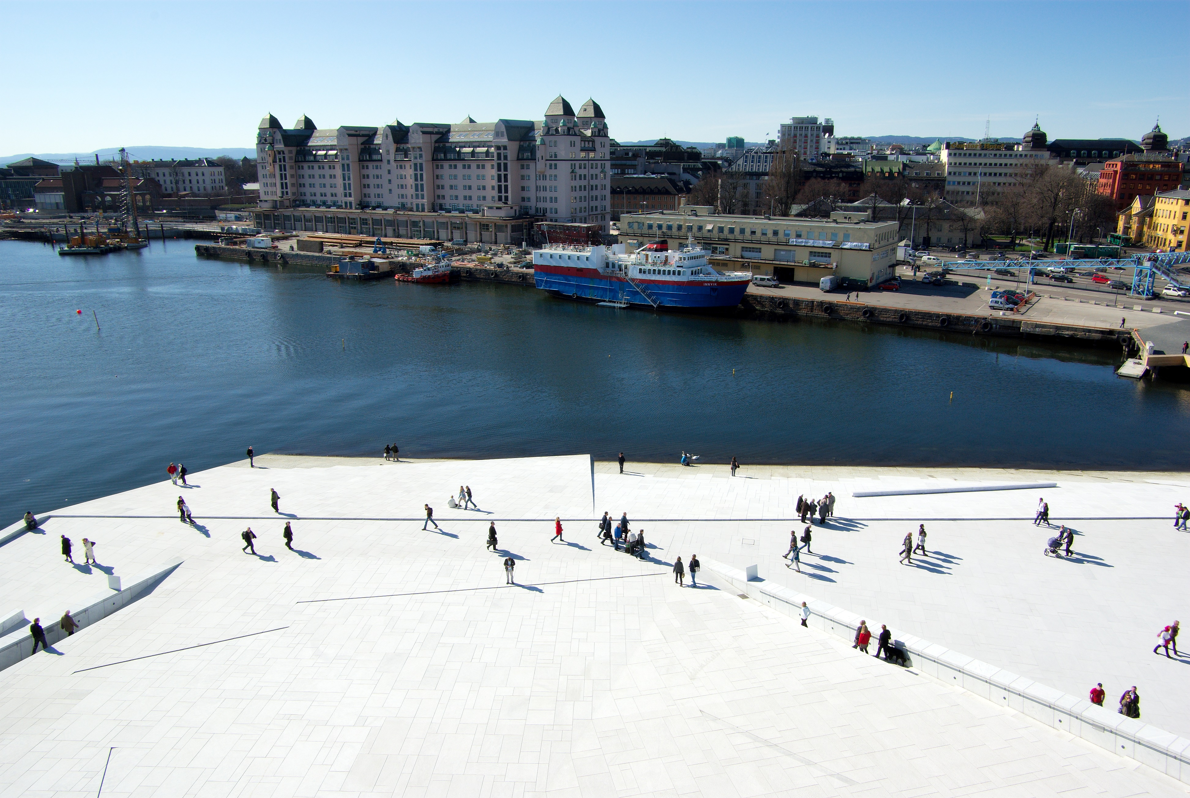 Oslo Opera House Bjørvika, Oslo, Norway, April 2008 © 2005, 2006, 2007 by Bjørn Erik Pedersen Licensing:[edit]